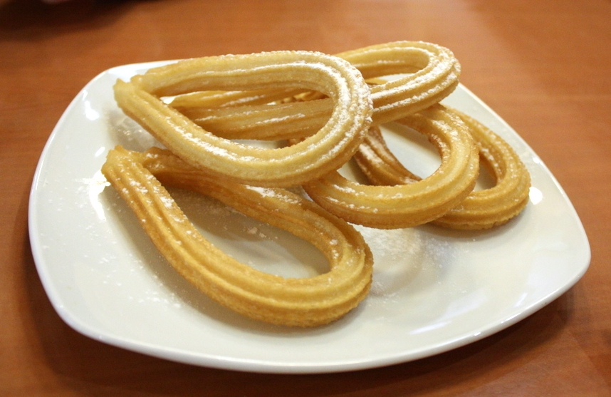 Churros servidos en un café de Madrid.